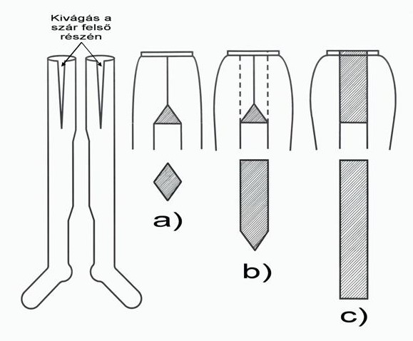 Harisnyanadrág részei és különböző lépésbetétek